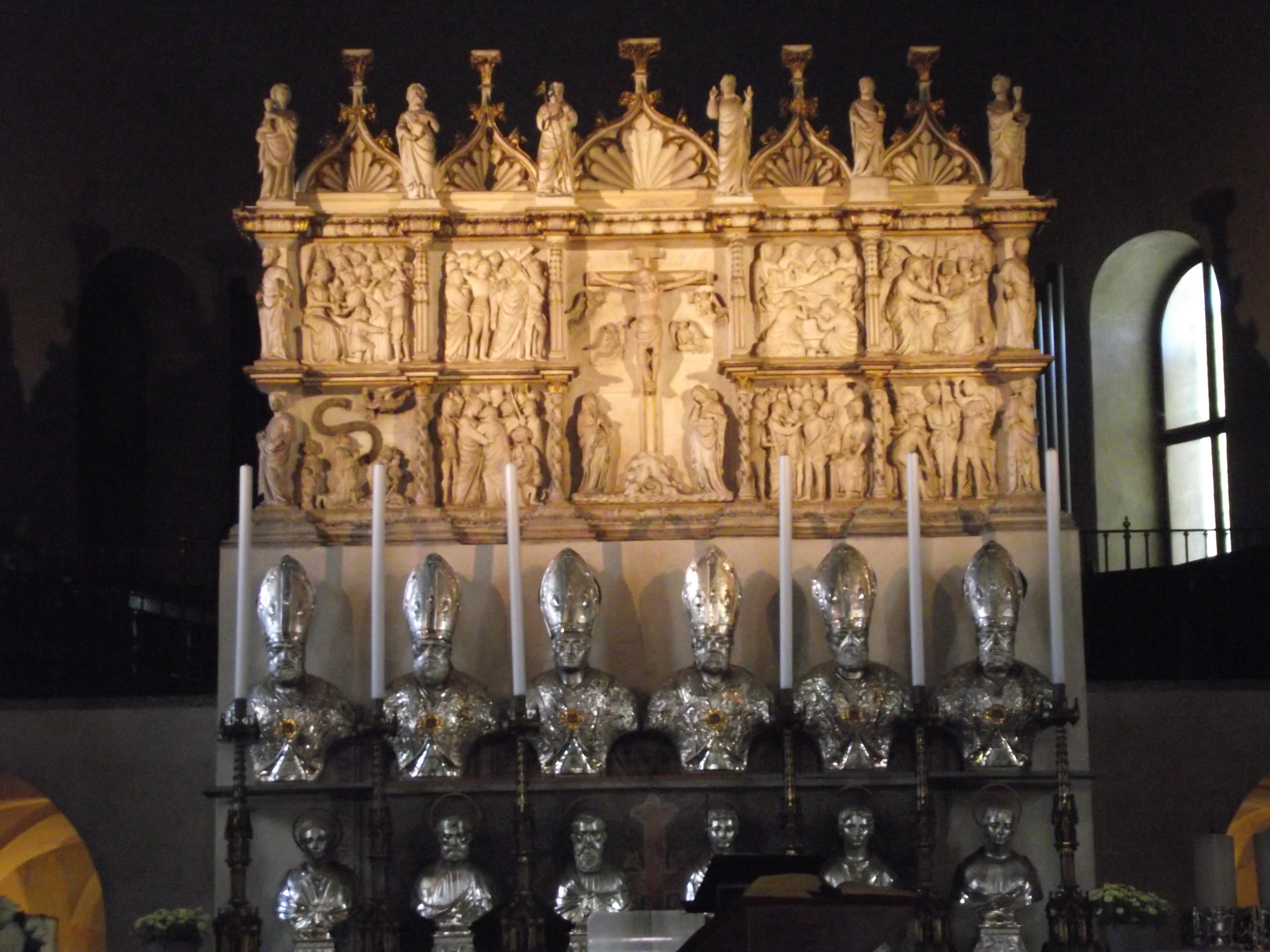 Ancona della Passione